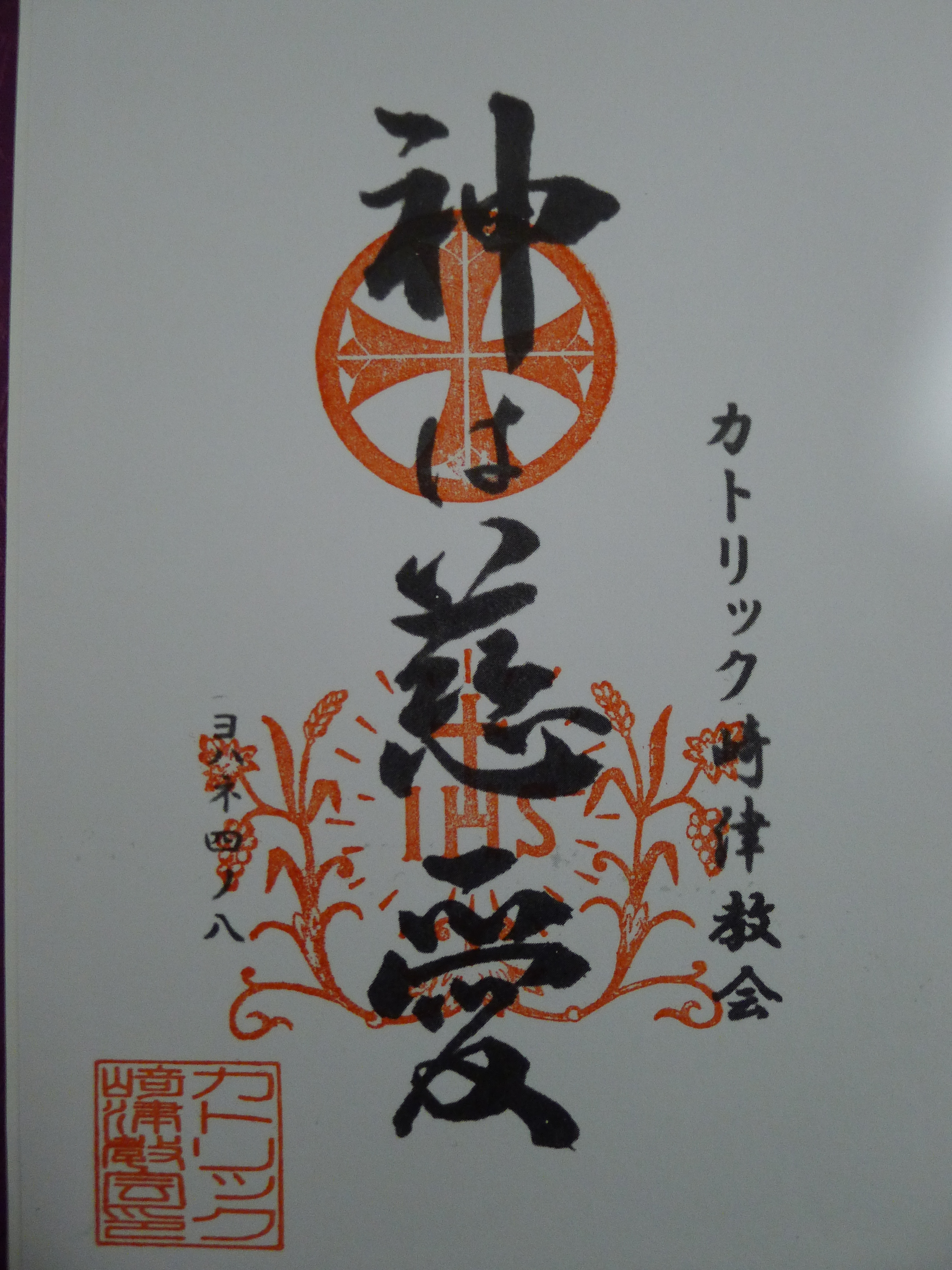 世界遺産「長崎と天草地方の潜伏キリシタン関連遺産」の構成資産・﨑津集落にある﨑津教会の御朱印。カトリック教会では唯一の御朱印になる。